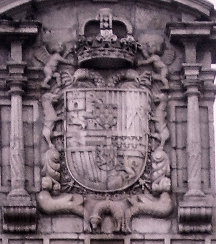 Escudo de España del reinado de Carlos II situado en la fachada del ayuntamiento de Ponferrada, León, España